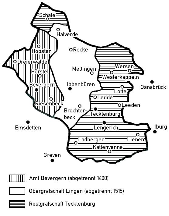 Der Kreis Tecklenburg in geschichtlicher Darstellung